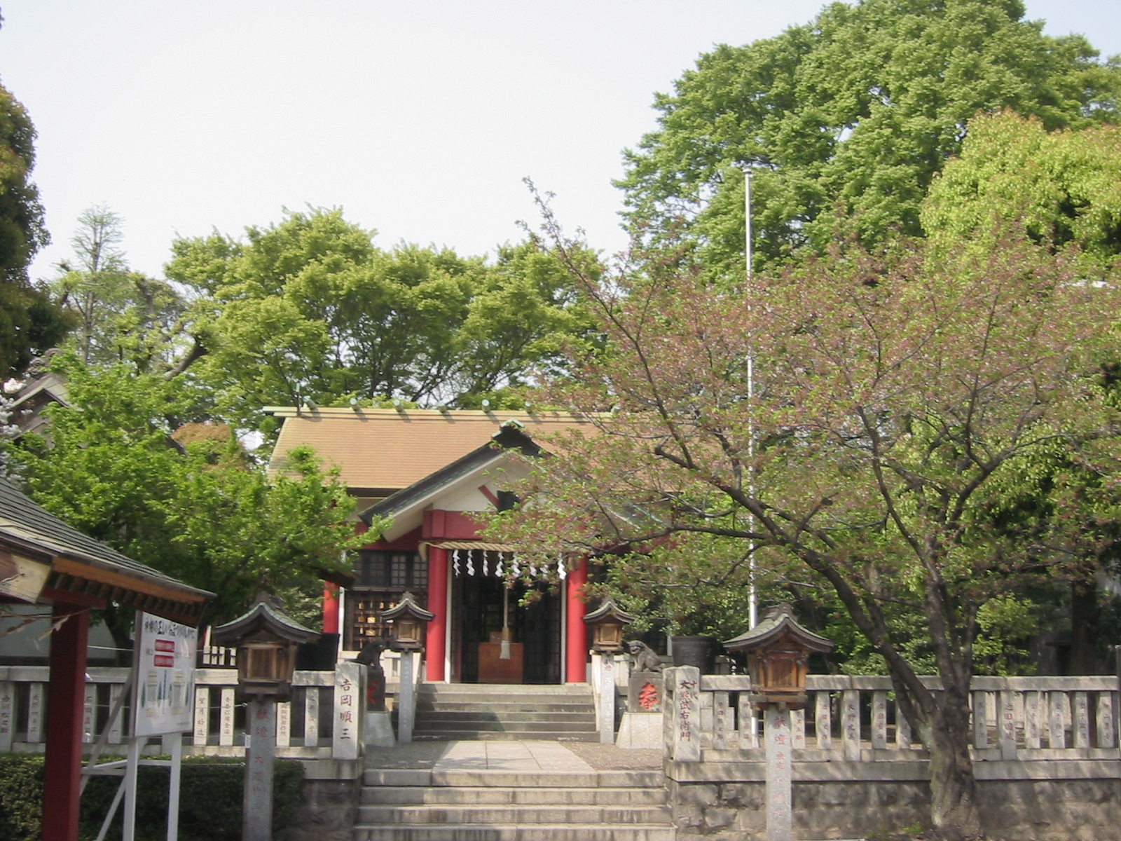 元郷氷川神社の写真。